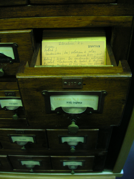 Card catalogs